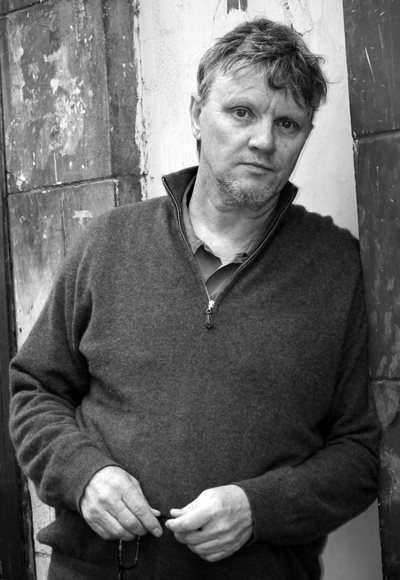 Forfatter, musiker og regissør Terje Dragseth.